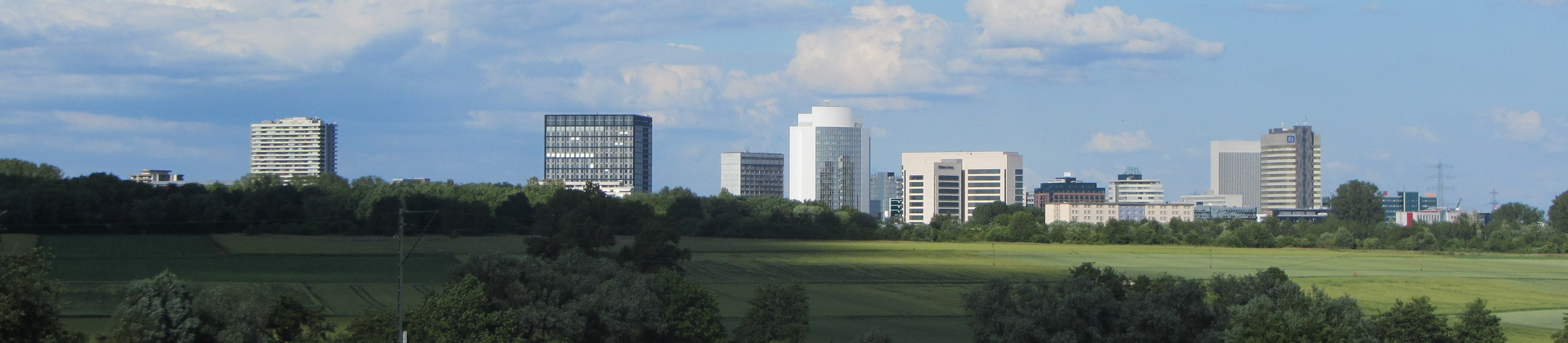 die Eschborner Skyline vom Sulzbacher Feld gesehen